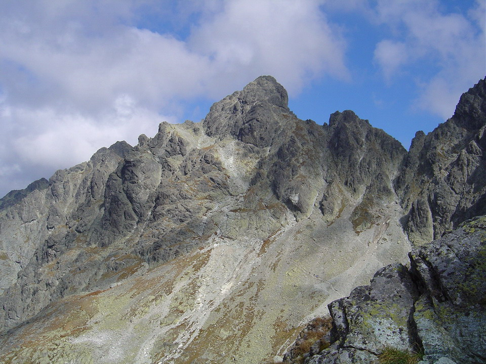 Diva veza from Polsky hreben